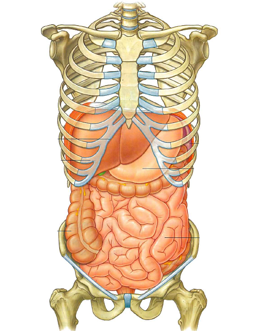 Imagen De vista Anterior de la caja torácica y cavidad abdominal donde podemos observar: El hígado, Asas intestinales, parte del estomago y dos tercios derechos del Colon.